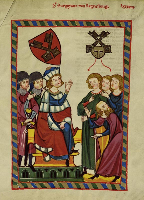 Miniatur »der Burggraf von Regensburg«